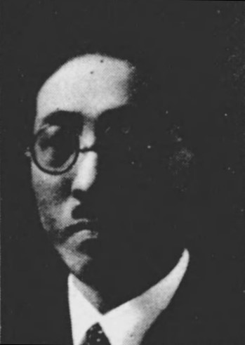 土田荘助（1888～1962）